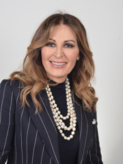 Ritratto Daniela Santanchè